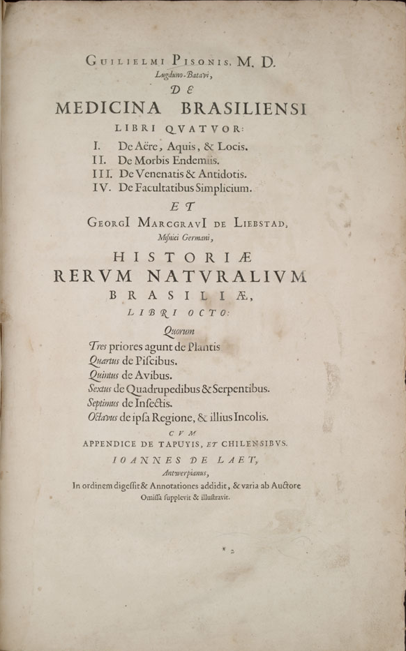 Índice geral da obra de Guilherme Piso - História Natural do Brasil (Historia Naturalis Brasiliae).